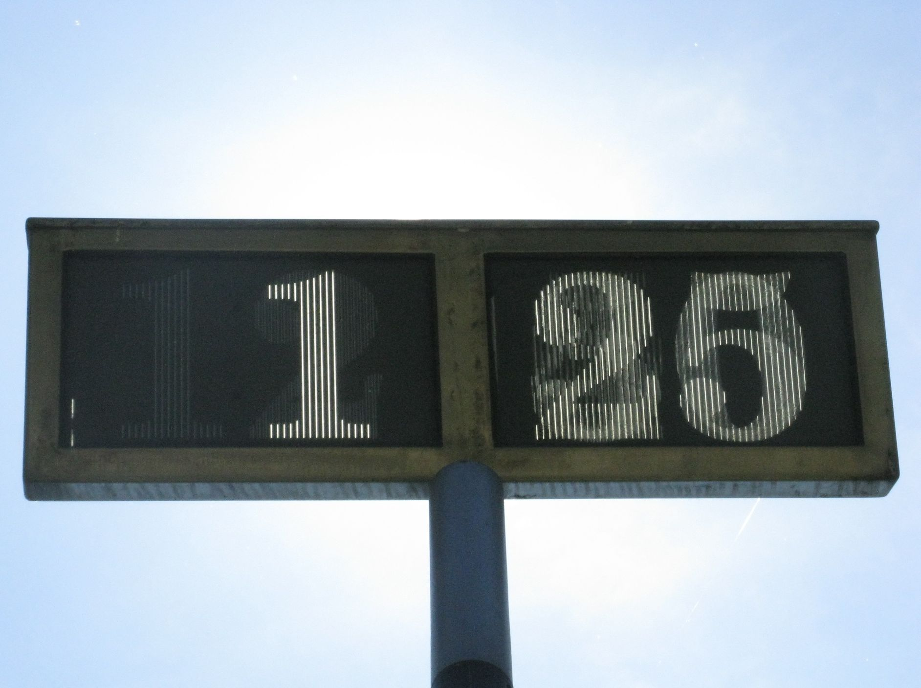 Sonnenuhrenpark in Genk/B: Digitale Sonnenuhr mit Ziffernanzeige